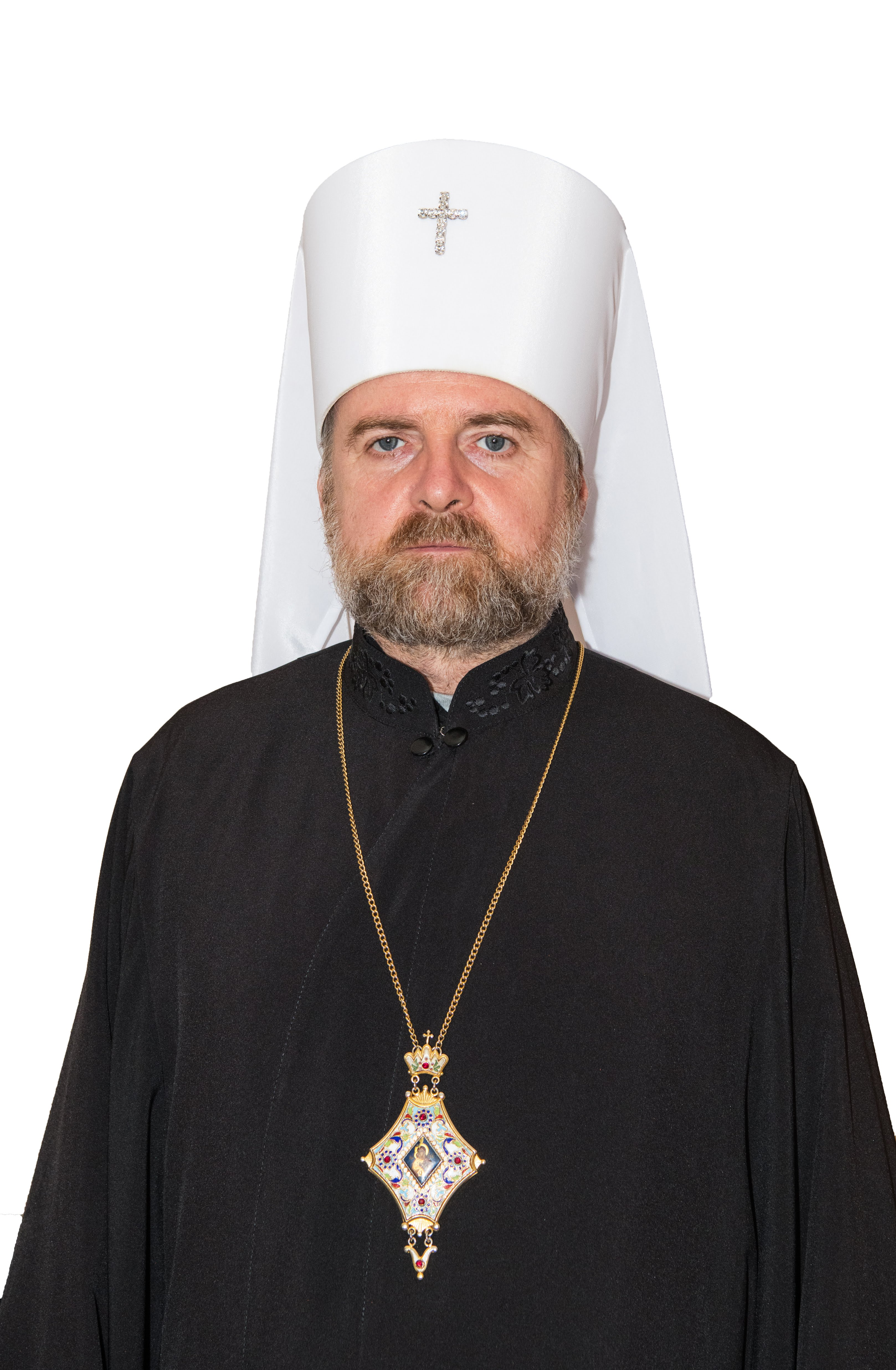 Зустріч з капеланами Бундесверу 2018